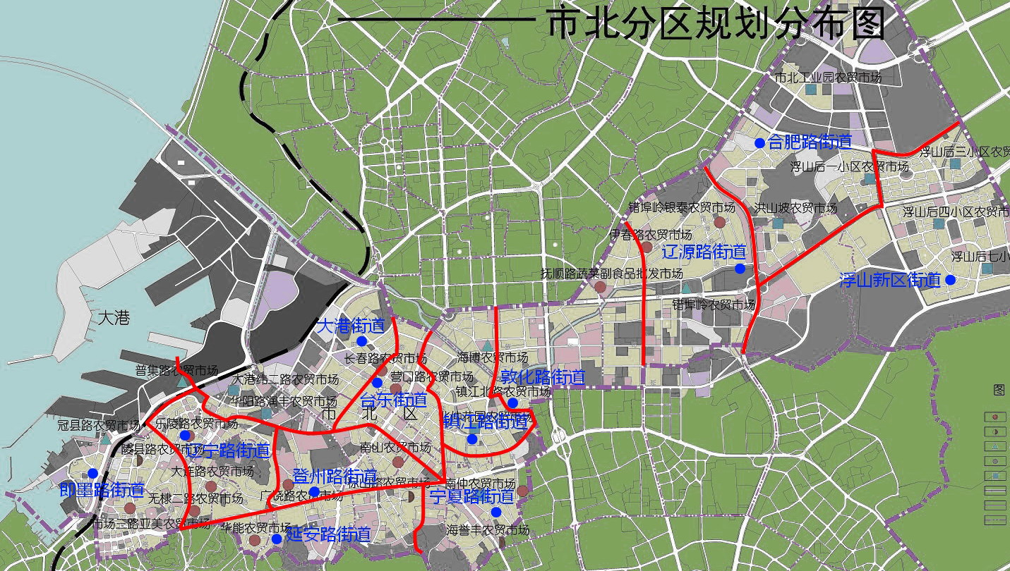 合署办公调整后的区划图